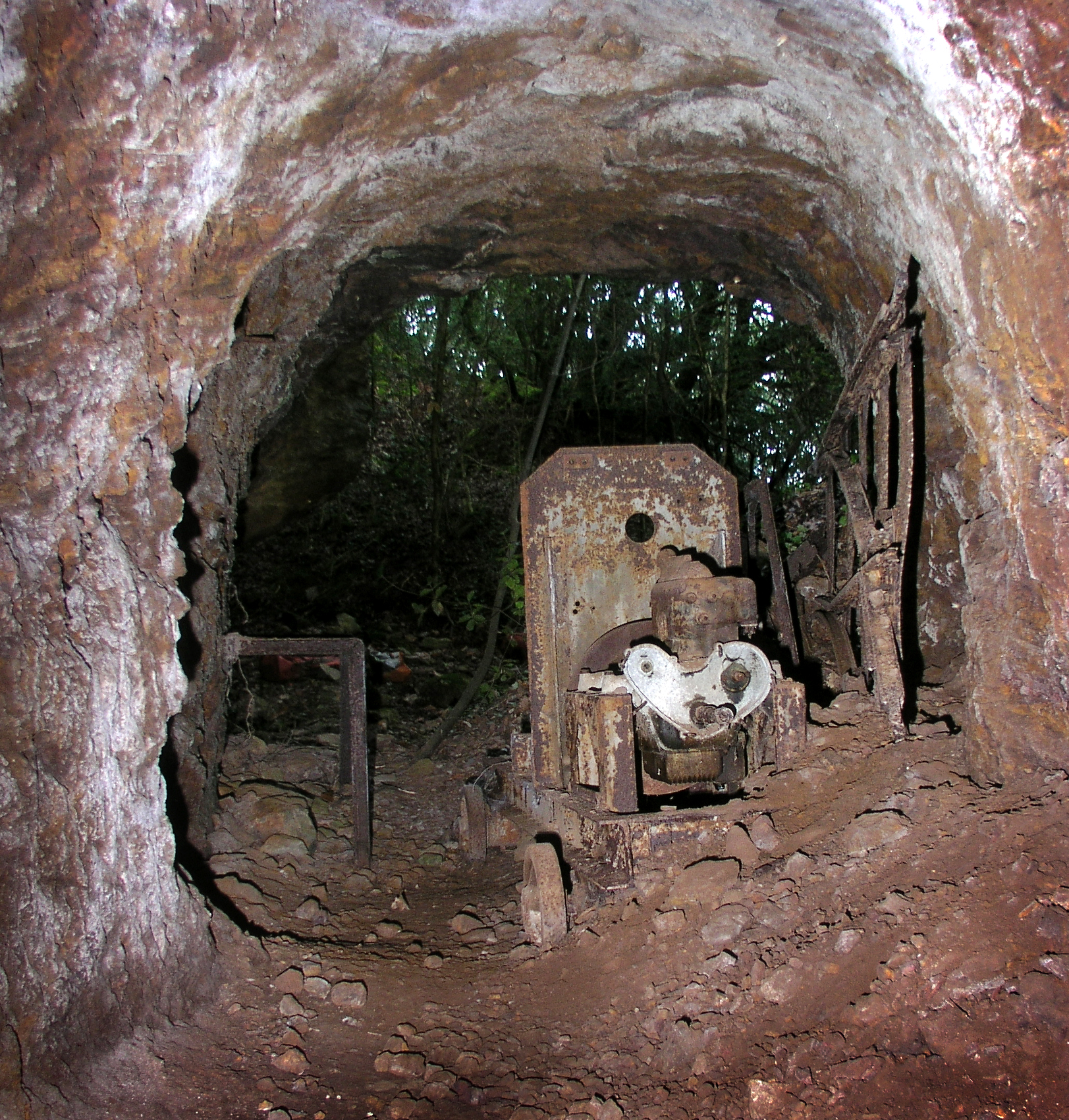 Galerie d'entrée d'une mine de fer à Cabrespine, Aude, France.